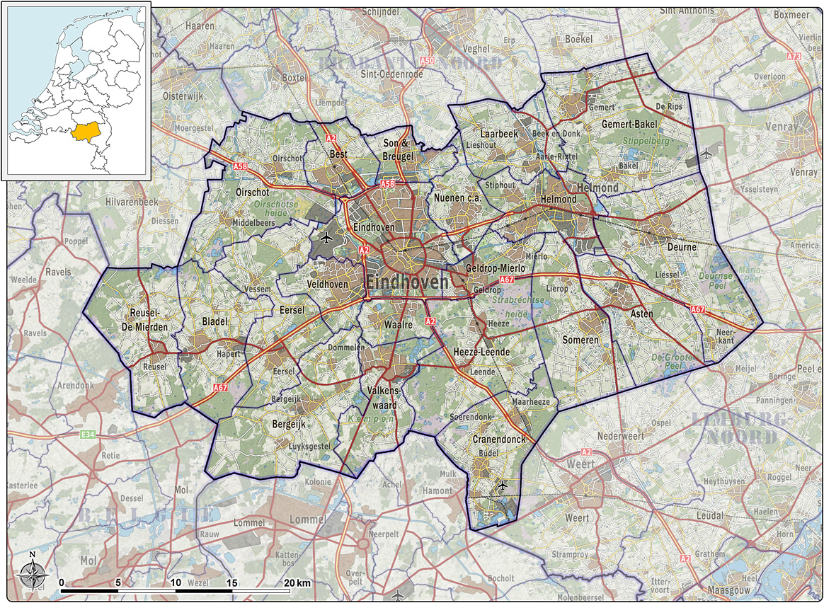 Kaart van de Veiligheidsregio Brabant-Zuidoost, met indeling van gemeenten (2013) en impressie van het landschap.